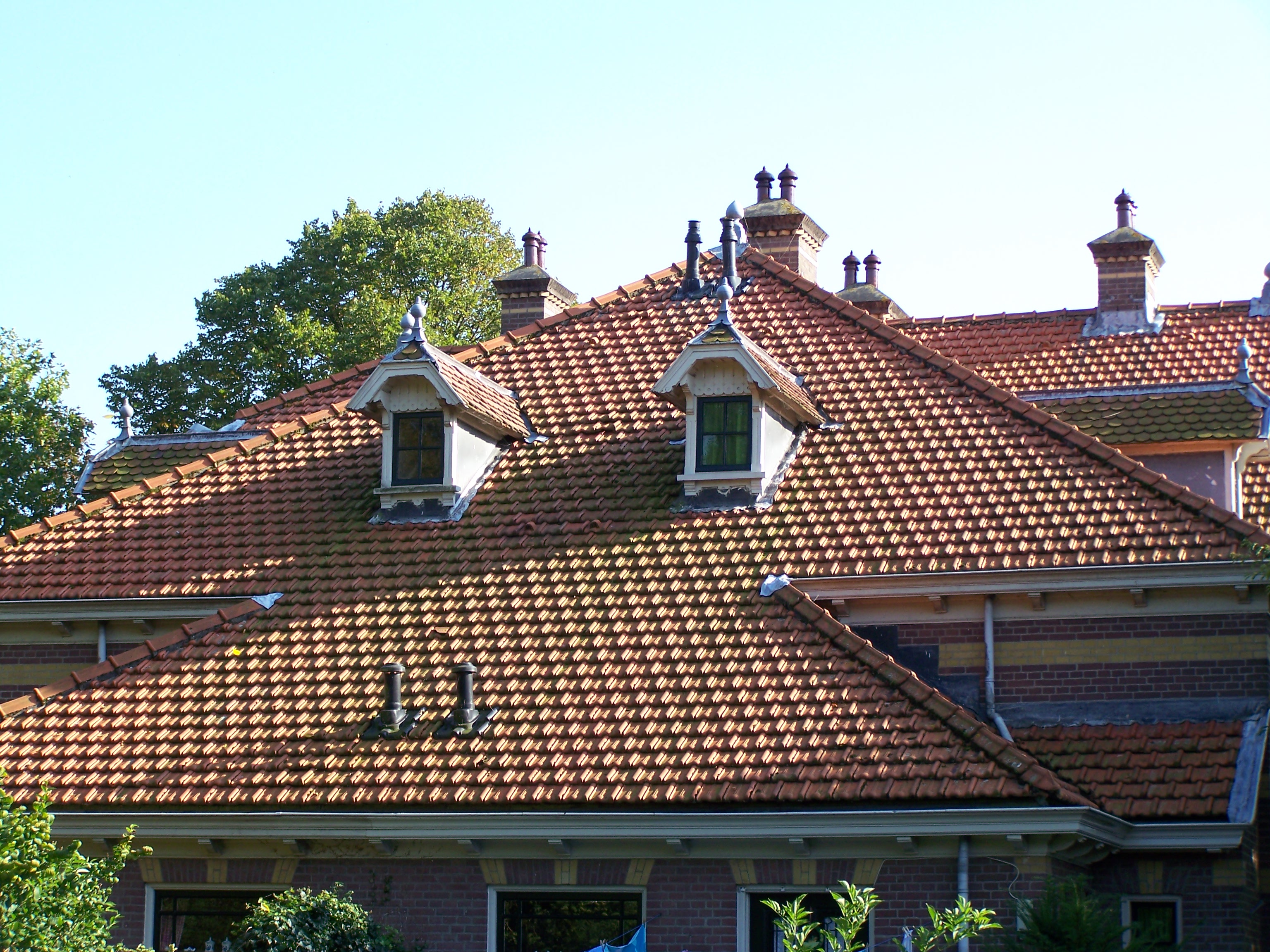 Snouck van Loosenpark zicht op een dak